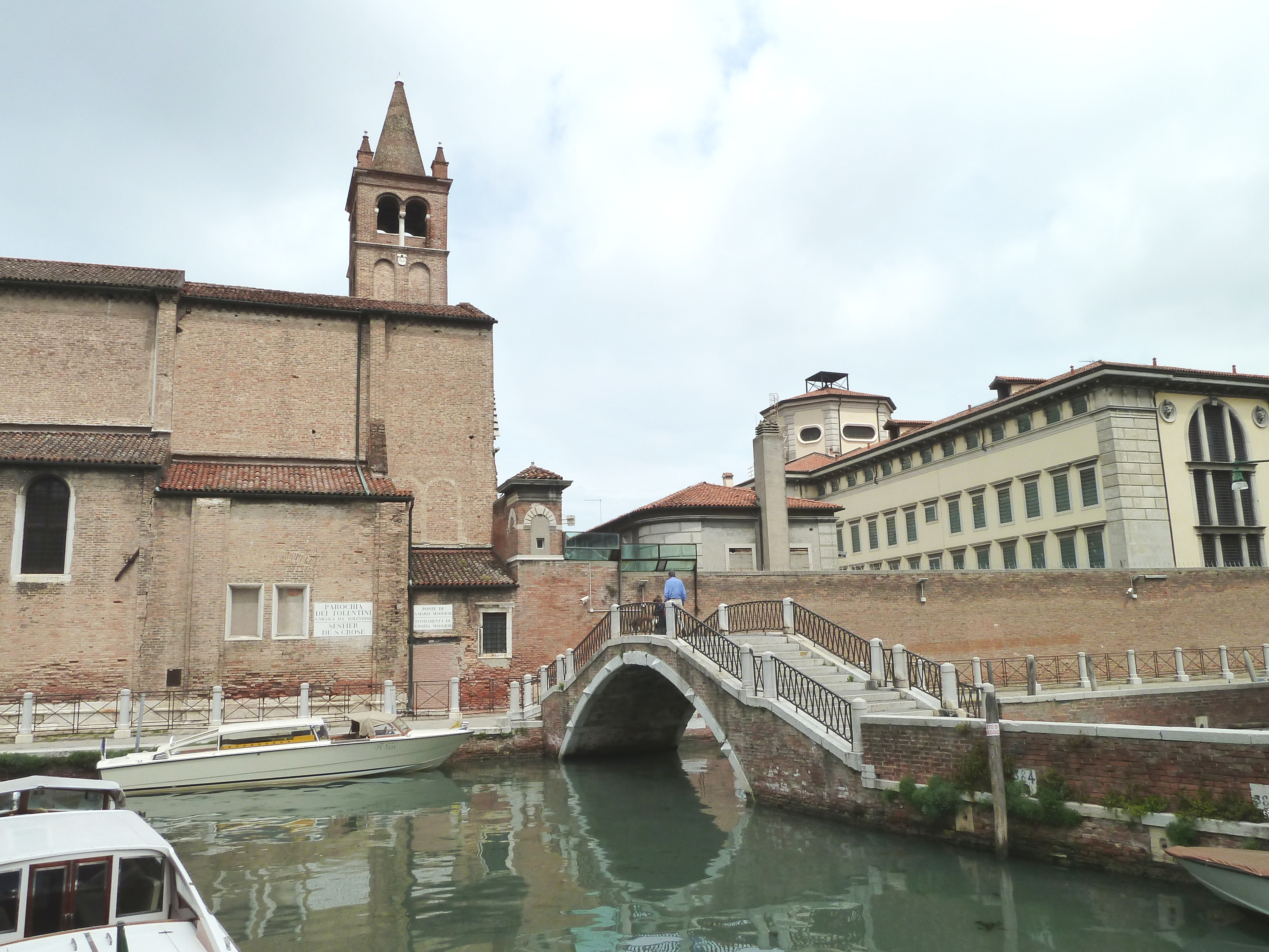 Ponte di Santa Maria Maggiore (Venice)